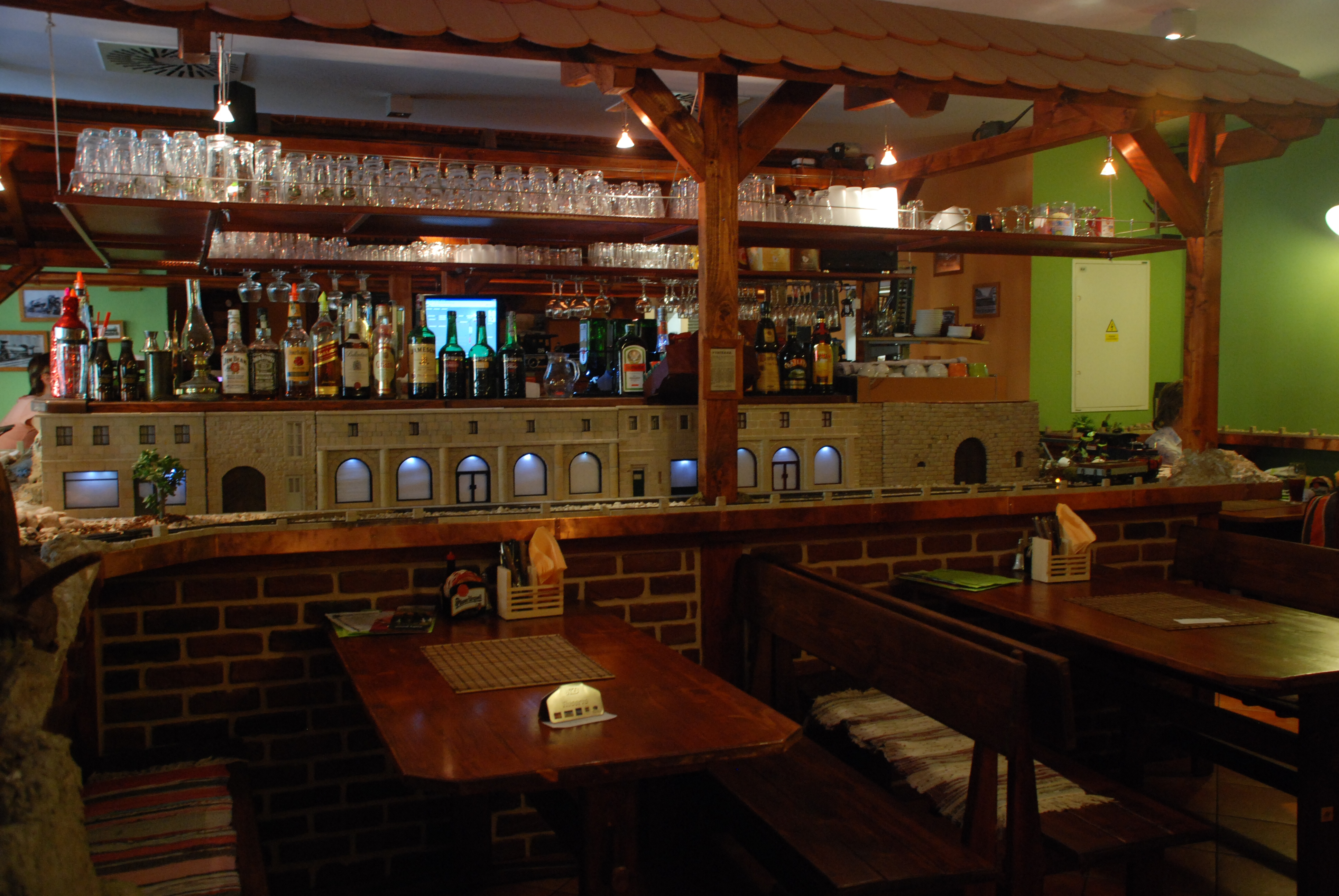 Interiér Výtopny v Brně.